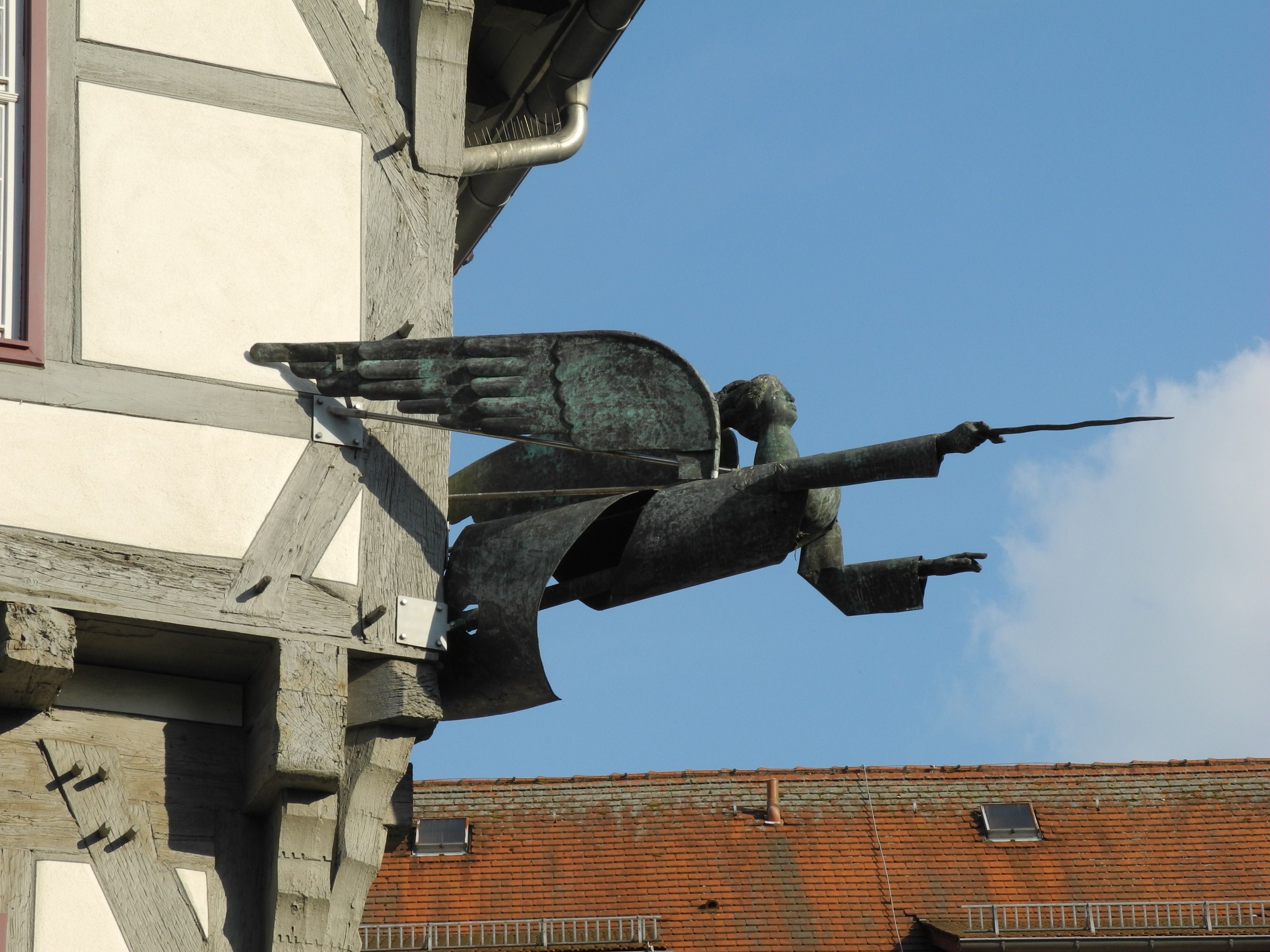 Schwäbisch Gmünd - Ehemaliges Amtshaus im Spital zum Heiligen Geist; Engel-Skulptur von Maria Kloss Maria Kloss (1940–) DescriptionGerman painter and sculptorDate of birth 1940 Location of birth